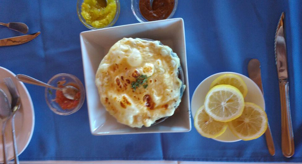 Gastronomía de Laraquete, Región del Biobío, Chile Chupe de mariscos, 2017